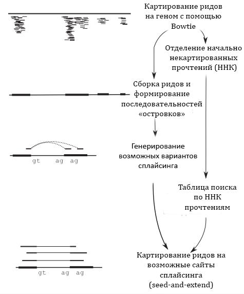 Для создания использовано изображение из статьи: Trapnell C, Pachter L, Salzberg S L. TopHat: discovering splice junctions with RNA-Seq. Bioinformatics, 2009, 25: 1105—1111.